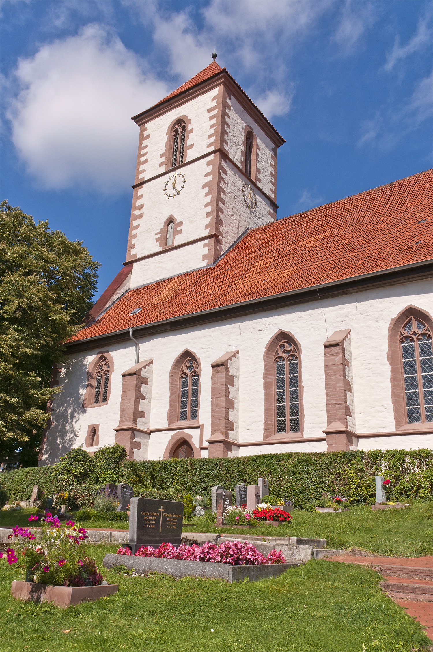 Klosterkirche Nikolausberg Göttingen von Süden 51° 33′ 42″ N, 9° 58′ 40″ O